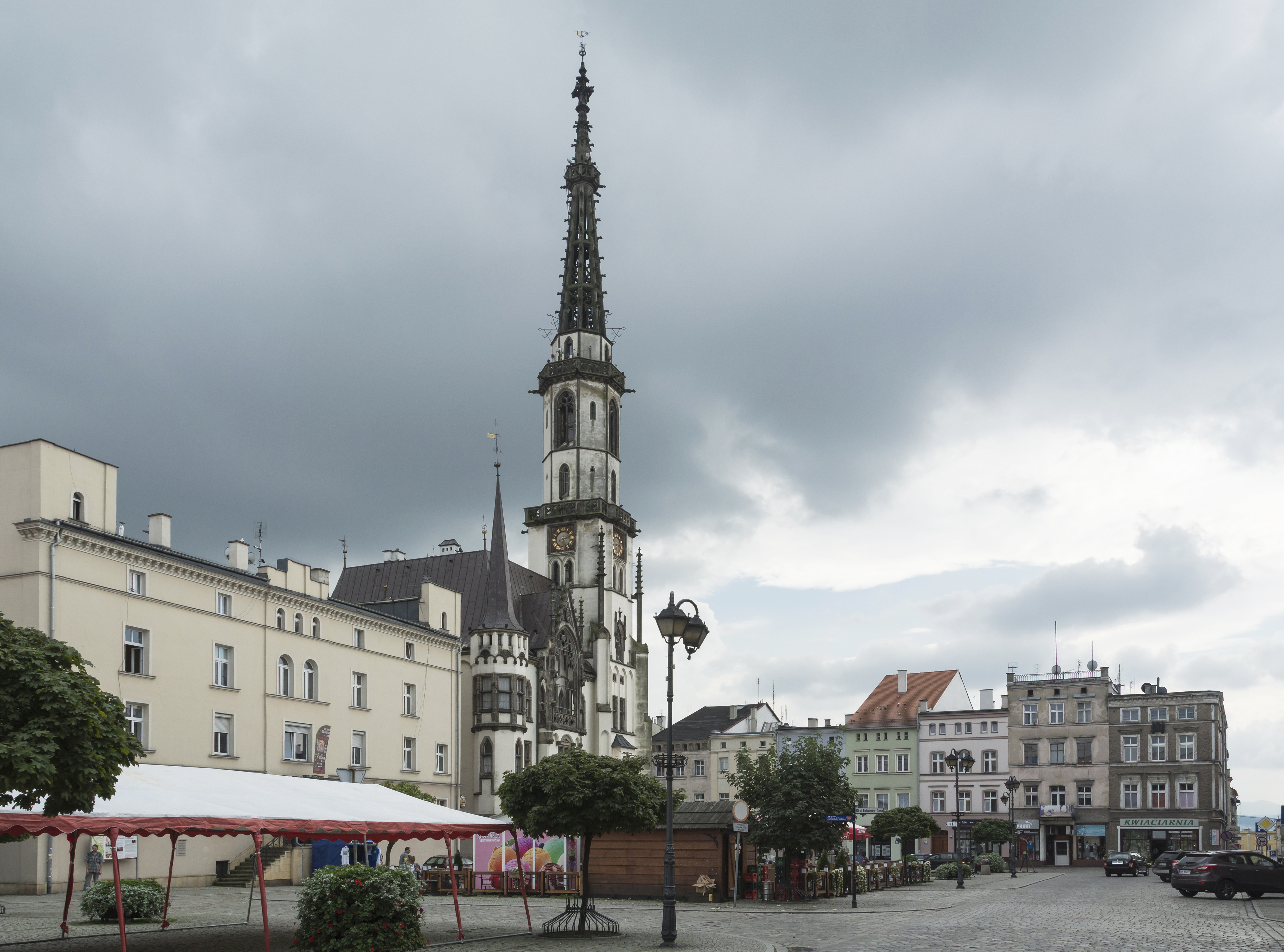 Ząbkowice Śląskie, ośrodek historyczny miasta